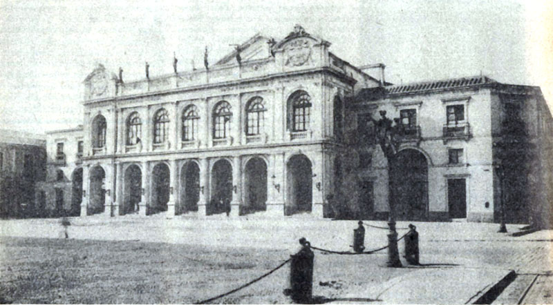 Teatro Municipal de Santiago a principios del siglo XX.